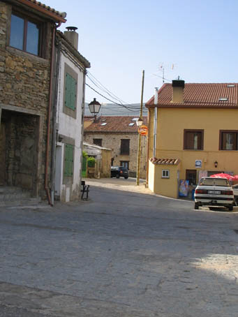 La Acebeda (Madrid)